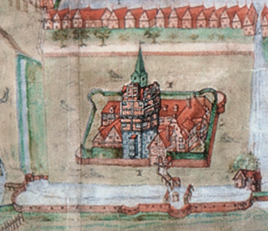 Schloss Nienburg innerhalb der Stadtbefestigung Nienburg